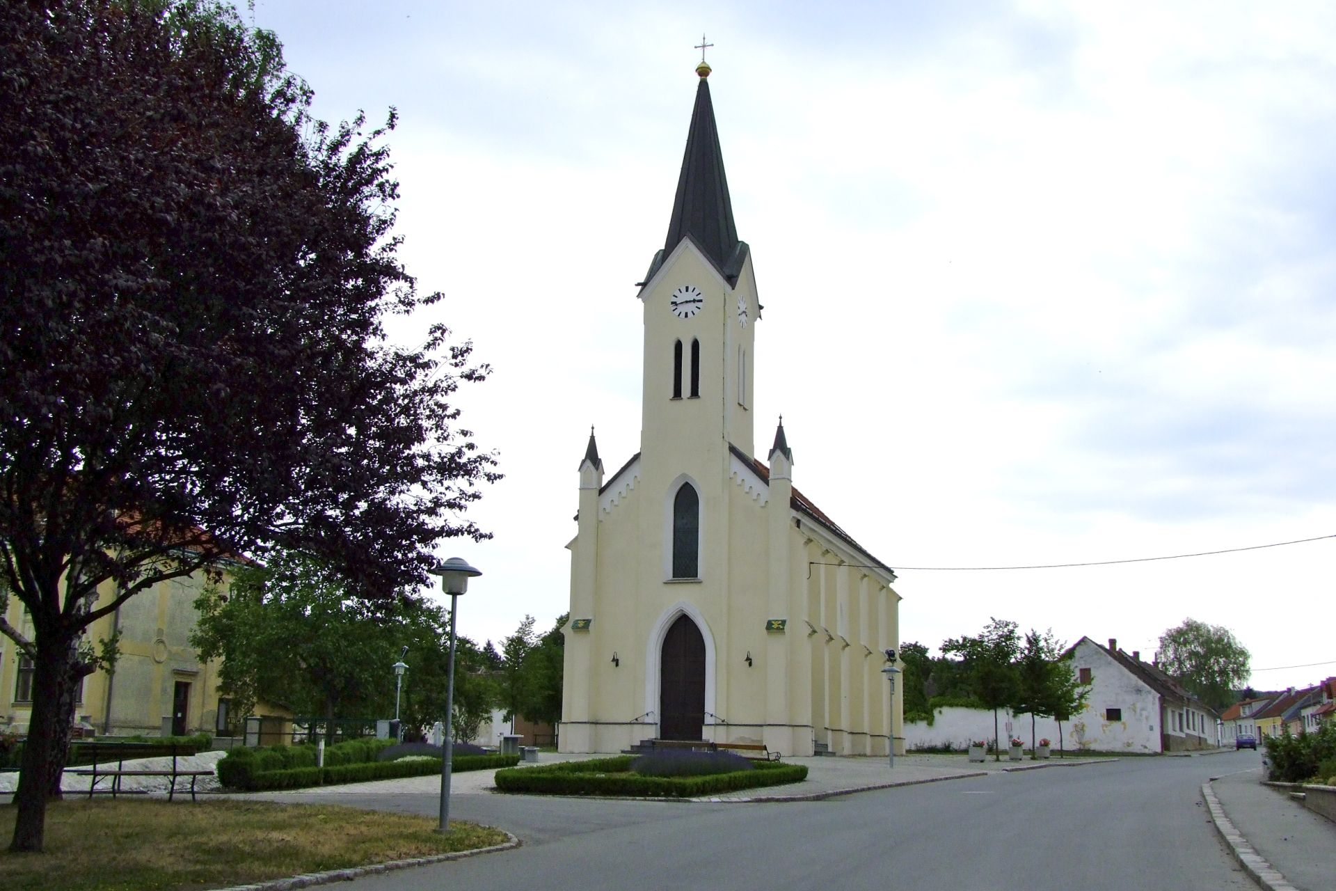 Kath. Filialkirche Mariahilf